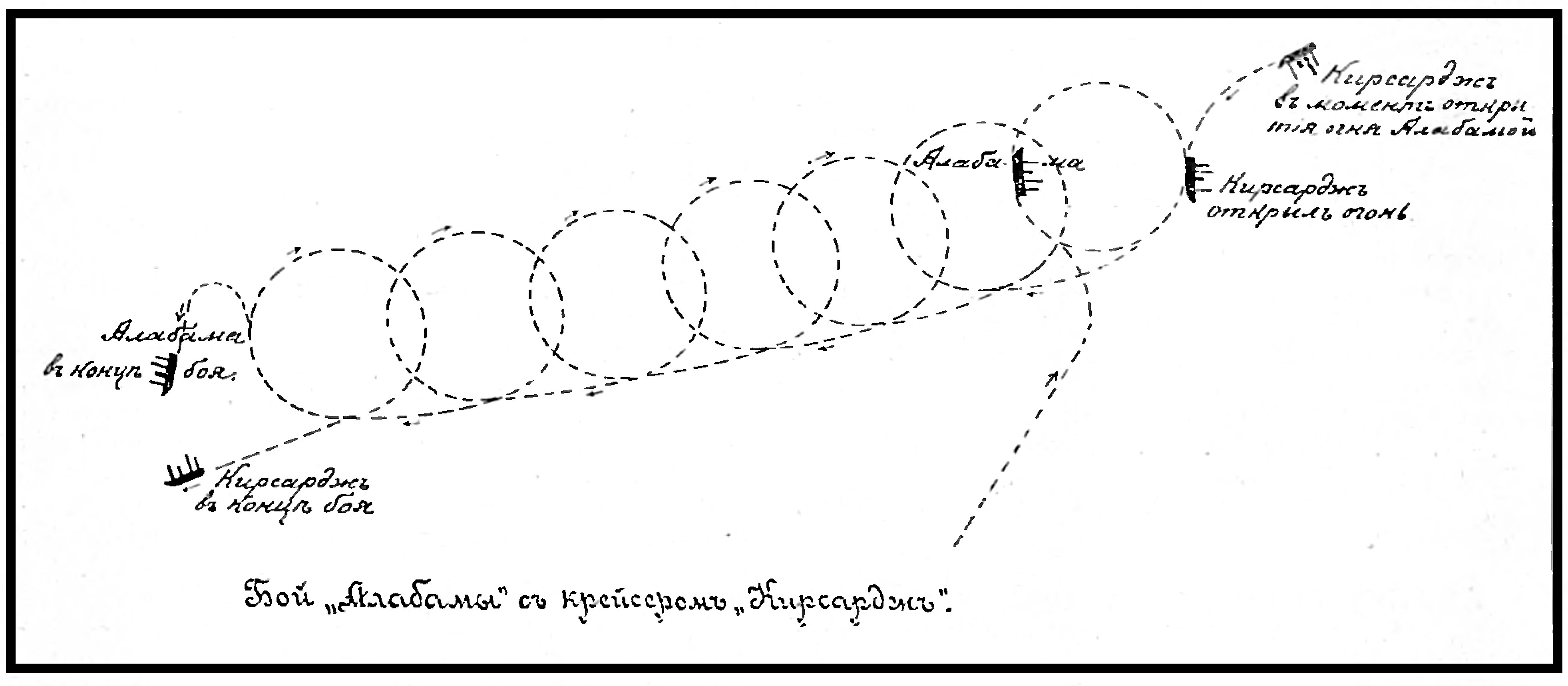 Изображение из «Военной энциклопедии» изданной книгоиздательским товариществом Ивана Дмитриевича Сытина. Санкт-Петербург; 1911—1915 гг. Фото к статье «Алабама».